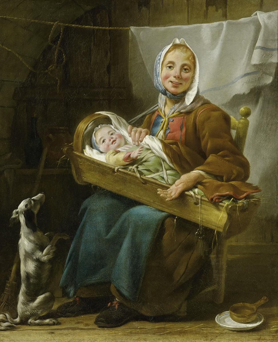 Signiert und datiert oben rechts: Hallé 1757. Öl auf Leinwand. Doubliert. 65 x 54 cm.